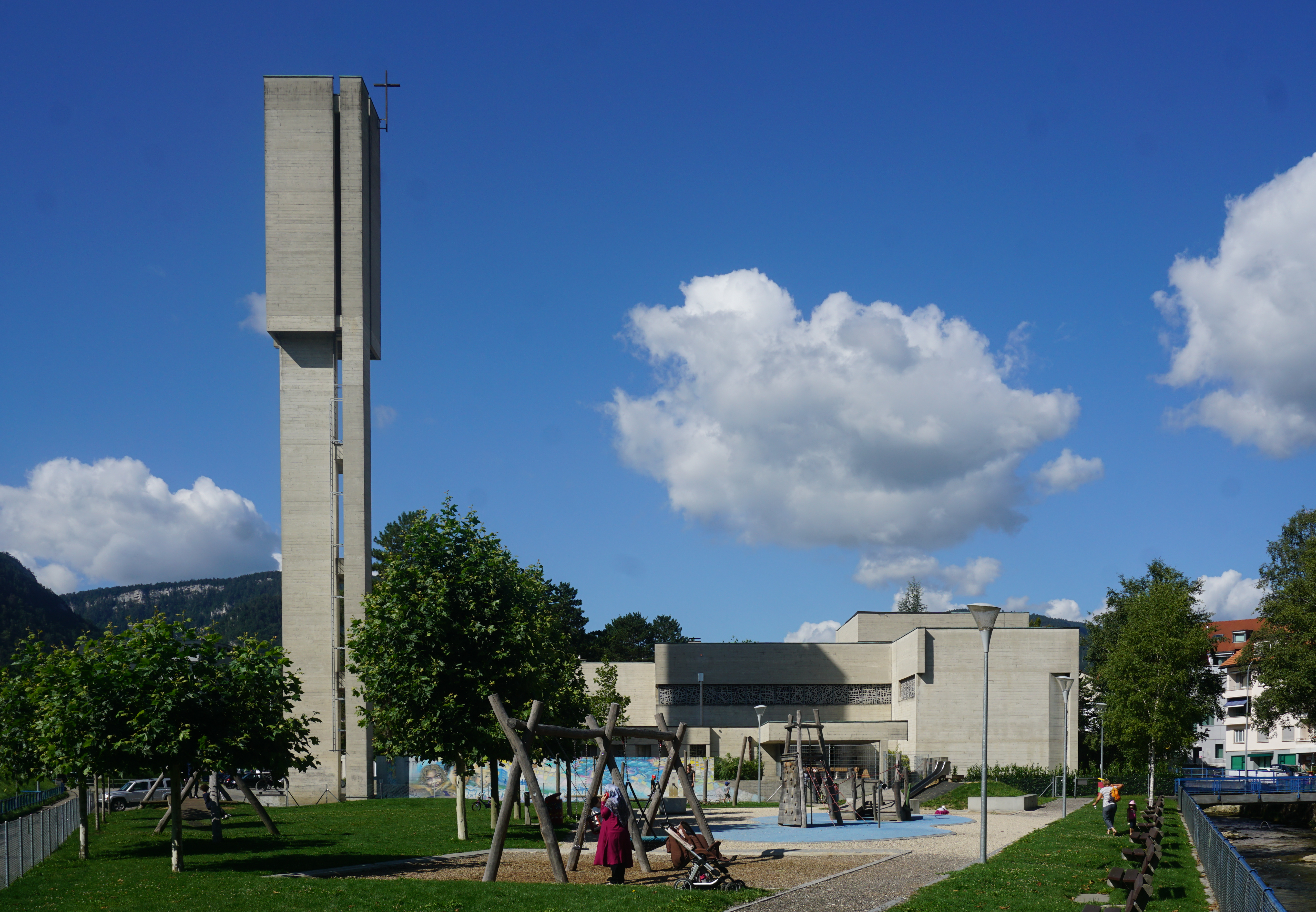 Notre-Dame de la Prévôté Ostseite mit Turm und Spielplatz